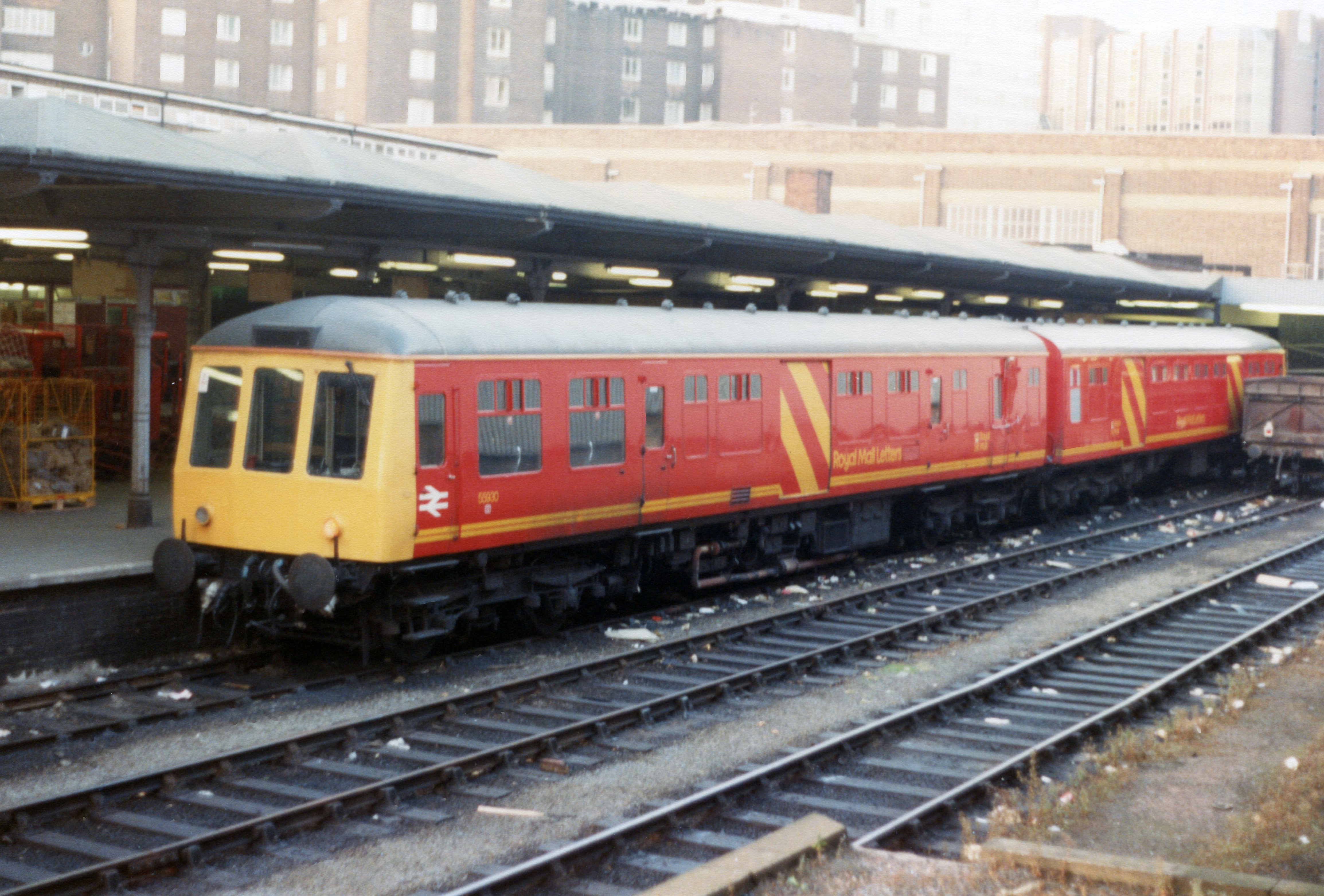 DMU